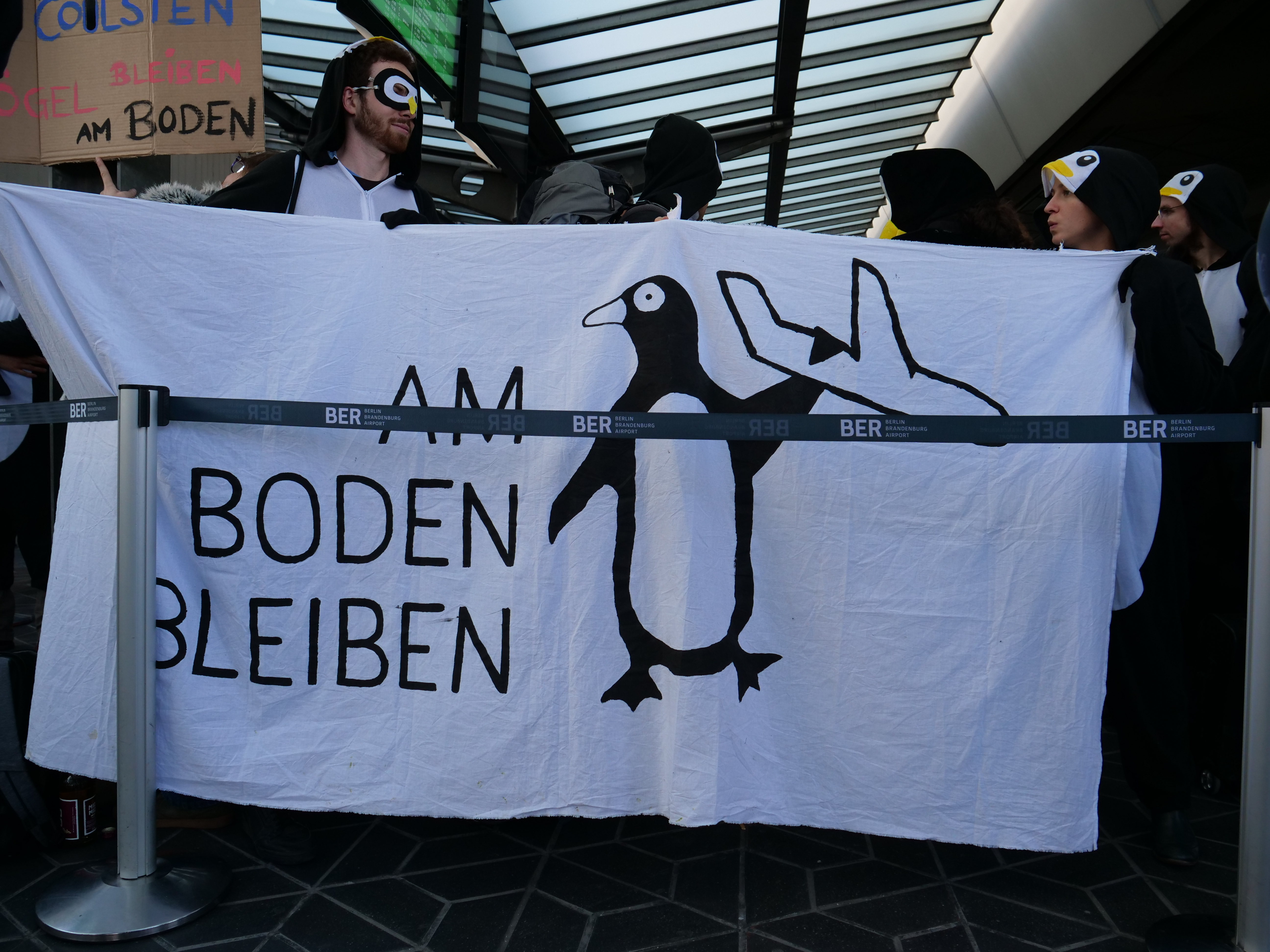 Abschluss der Protestaktion von AmBodenBleiben am 10. November 2019 im Hauptgebäude des Flughafens Tegel.